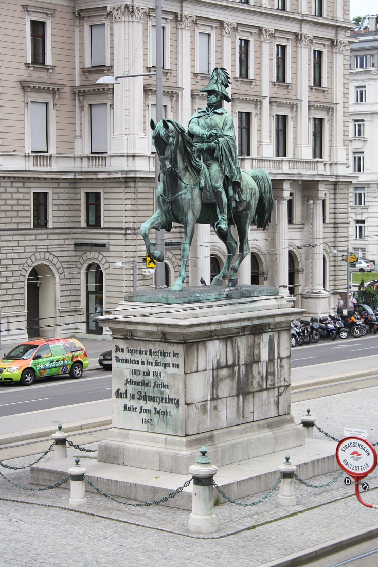 Karl Philipp zu Schwarzenberg-Reiterdenkmal am Schwarzenbergplatz im 1. Wiener Gemeindebezirk